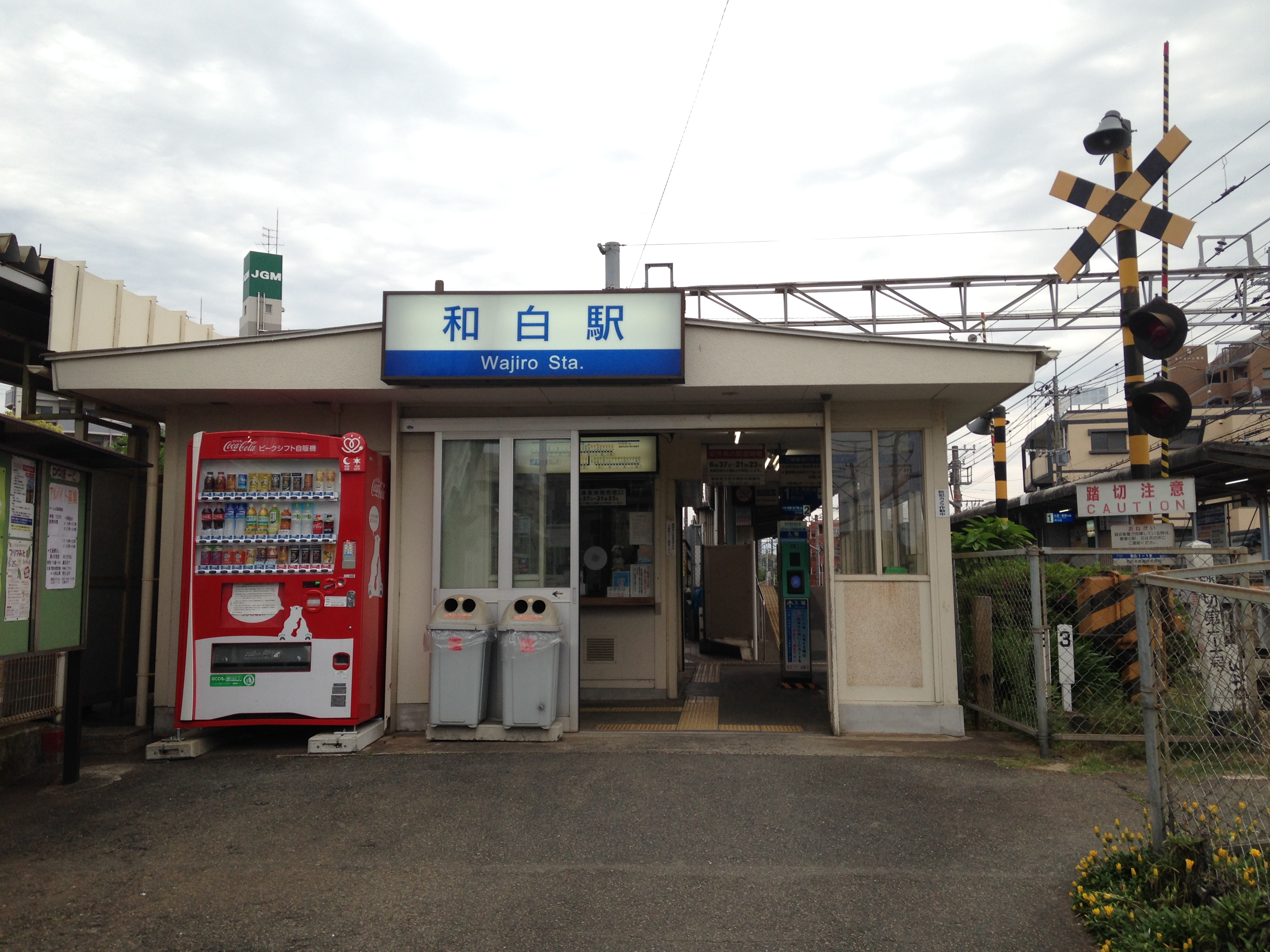 西鉄和白駅舎